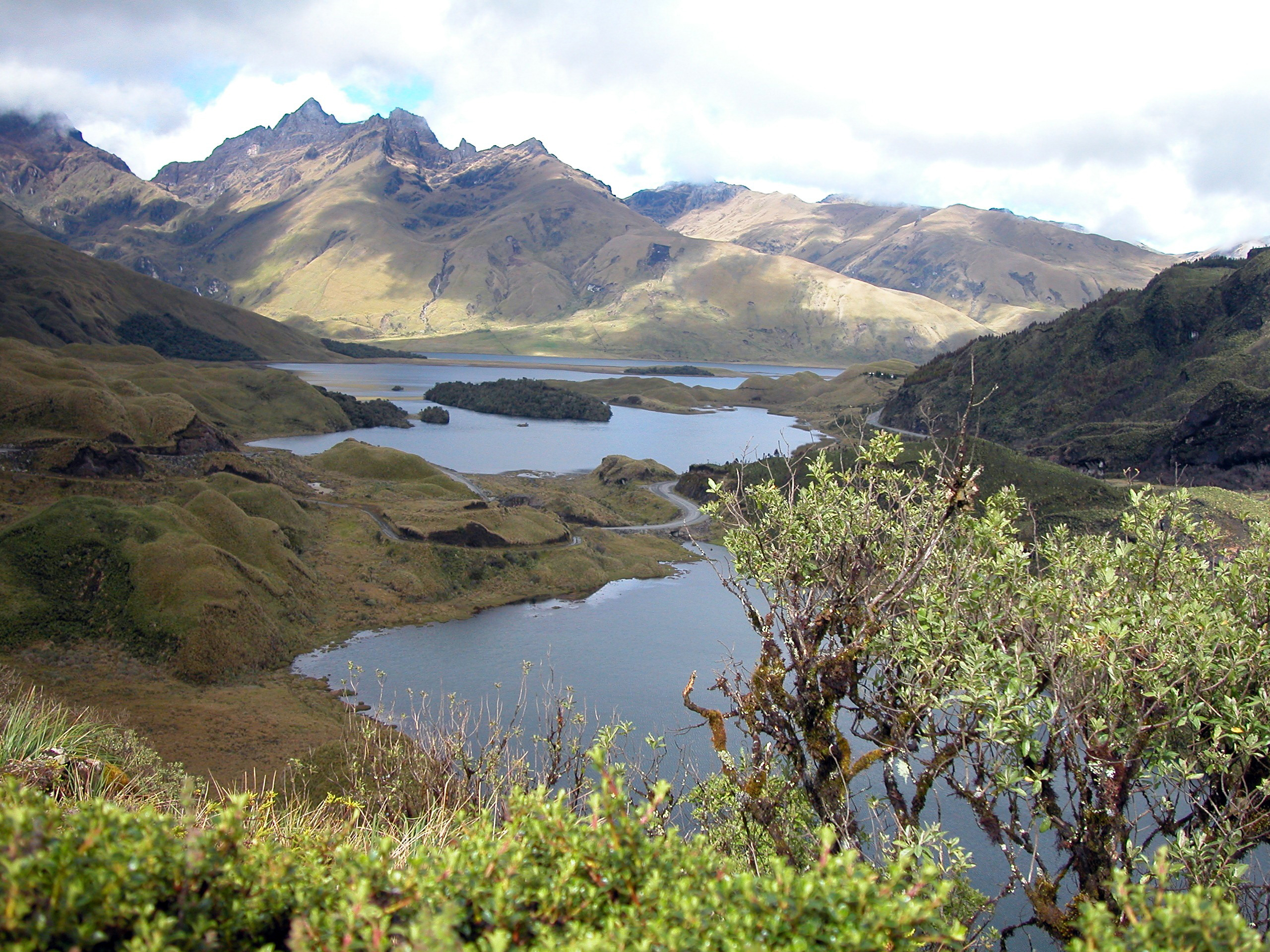 ANDES Laguna de Atillo Parque Nacional Sangay